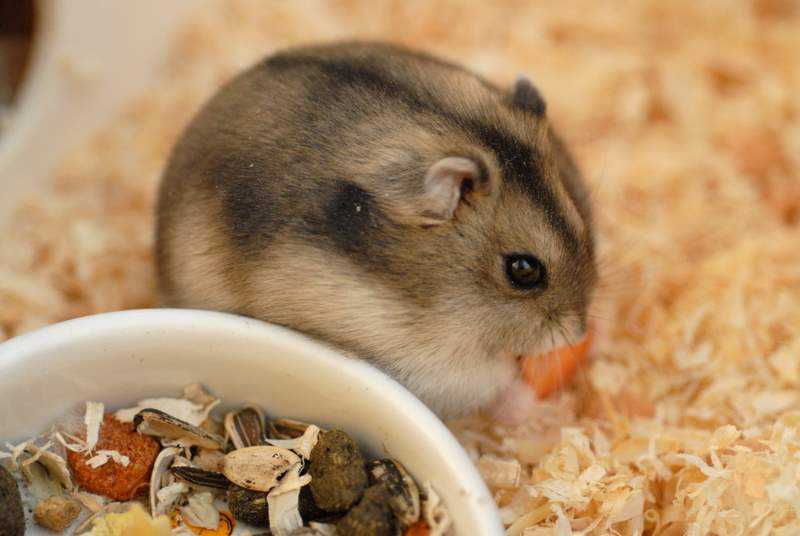 Phodopus Sungorus